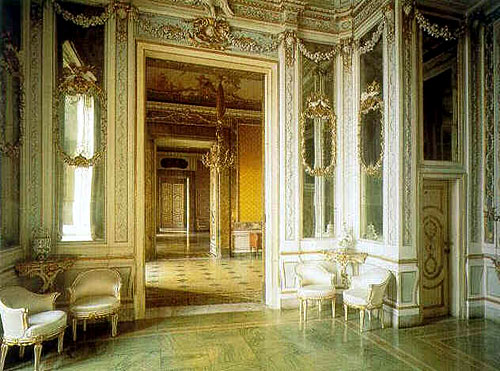 Reggia